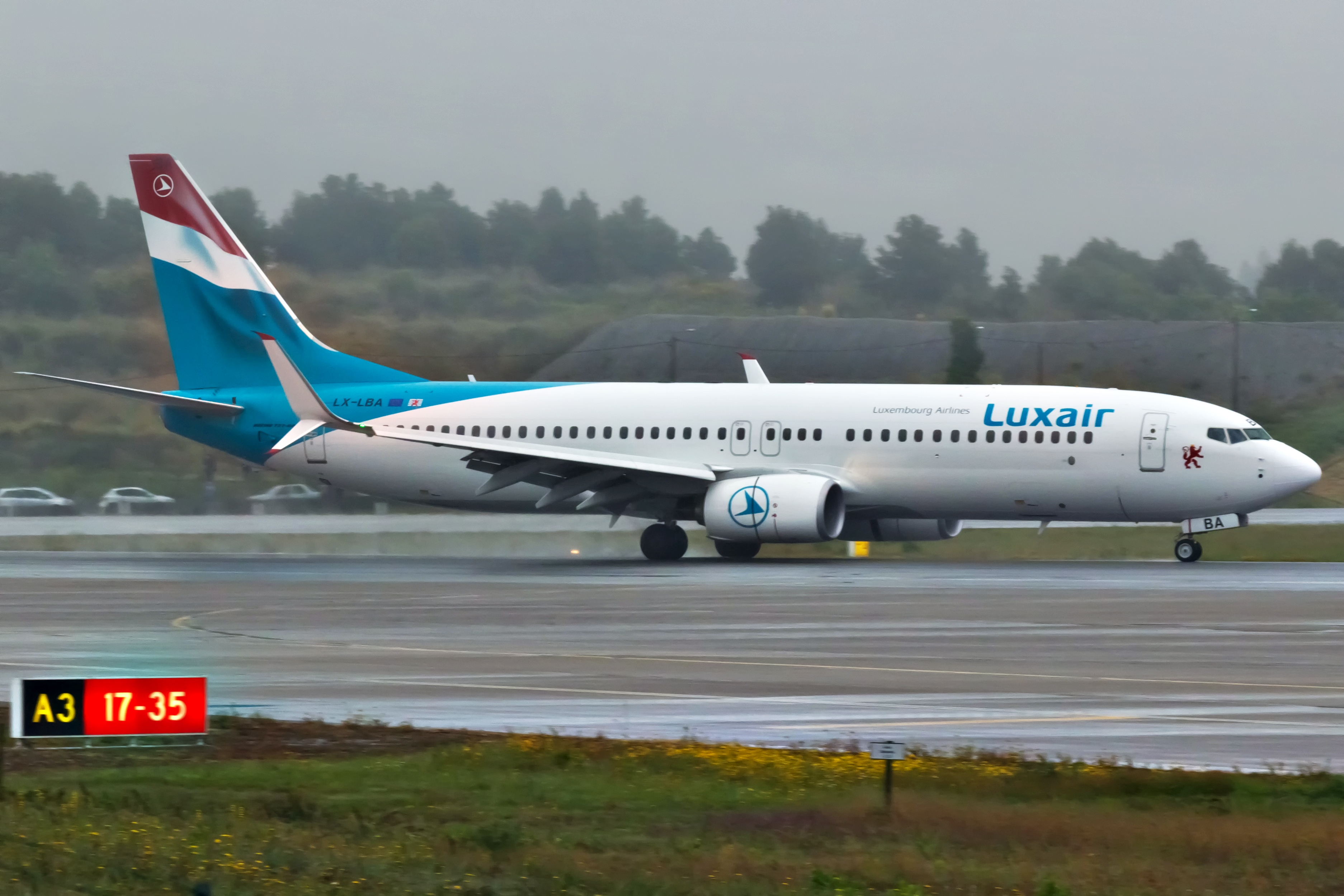 Boeing 737 de Luxair aterrando no aeroporto do Porto.